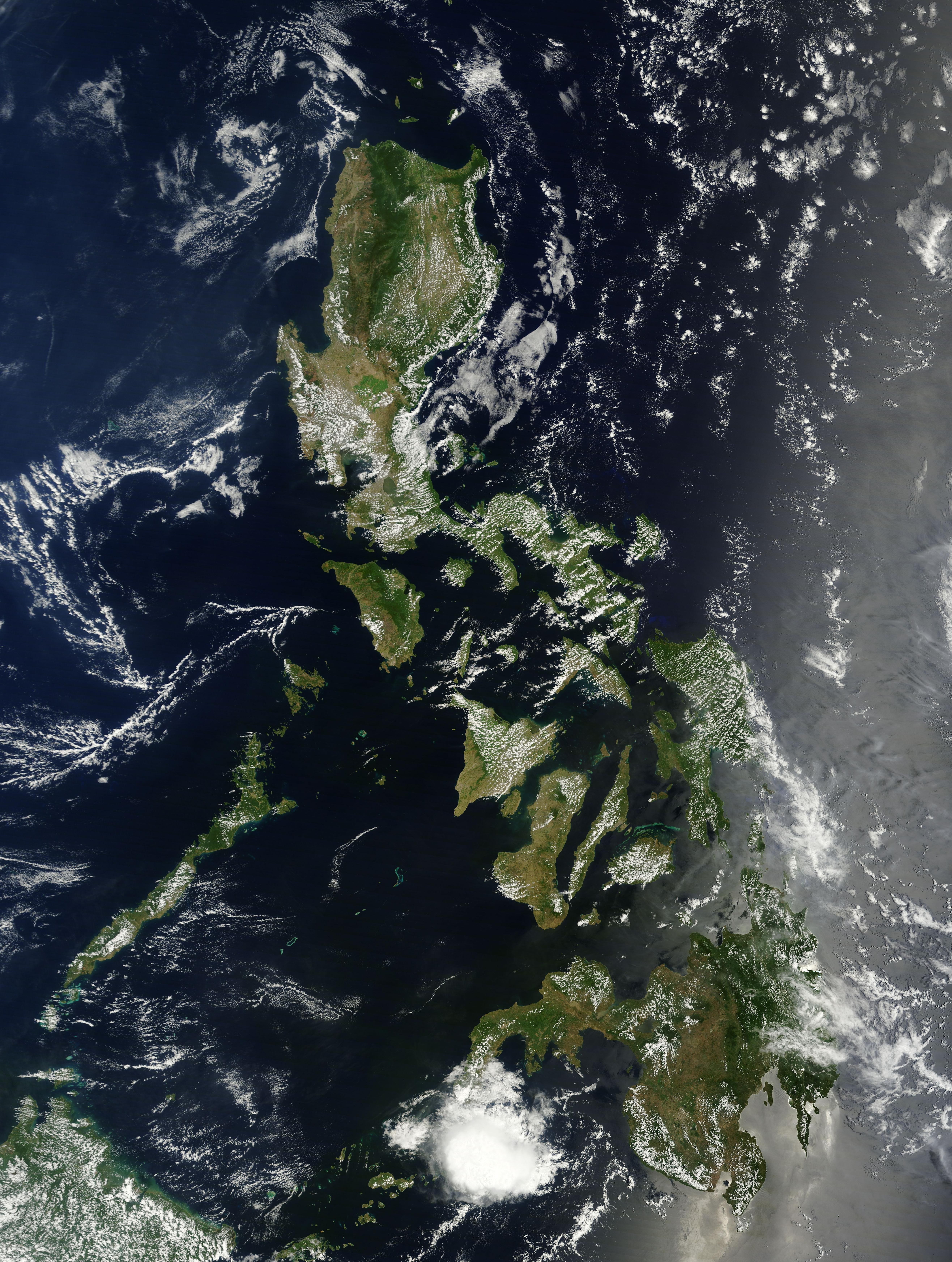 Las islas Filipinas tomado, desde el satélite Terra MODIS de la NASA el 4 de abril de 2015.